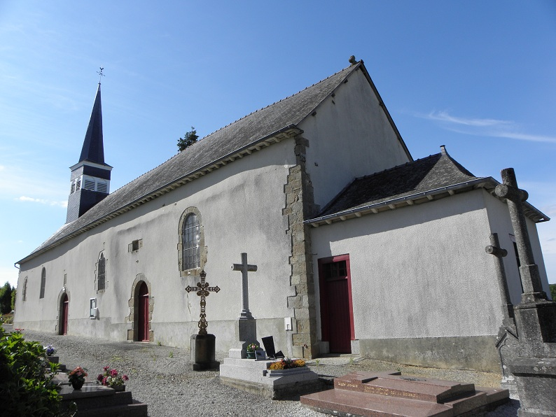 Église Saint-Sulpice à Saint-Sulpice-la-Forêt (35).